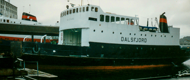 MF Dalsfjord i 1994